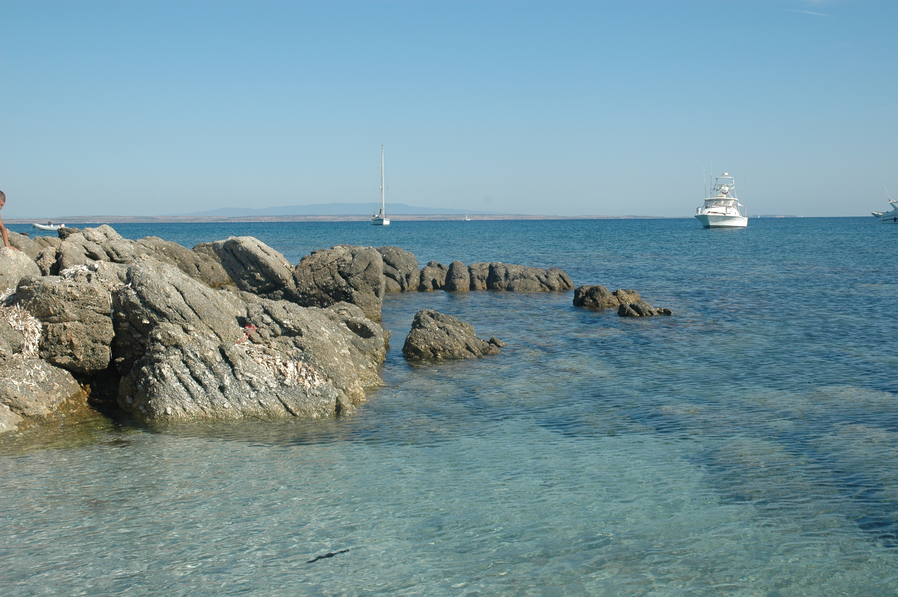 Isola di Mal di Ventre